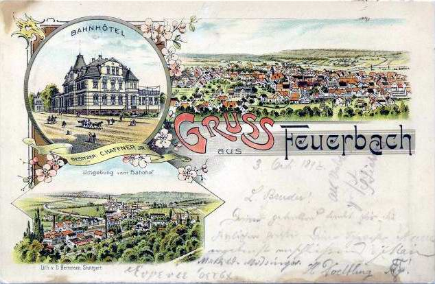 PD Ansichtskarte Feuerbach bei Stuttgart